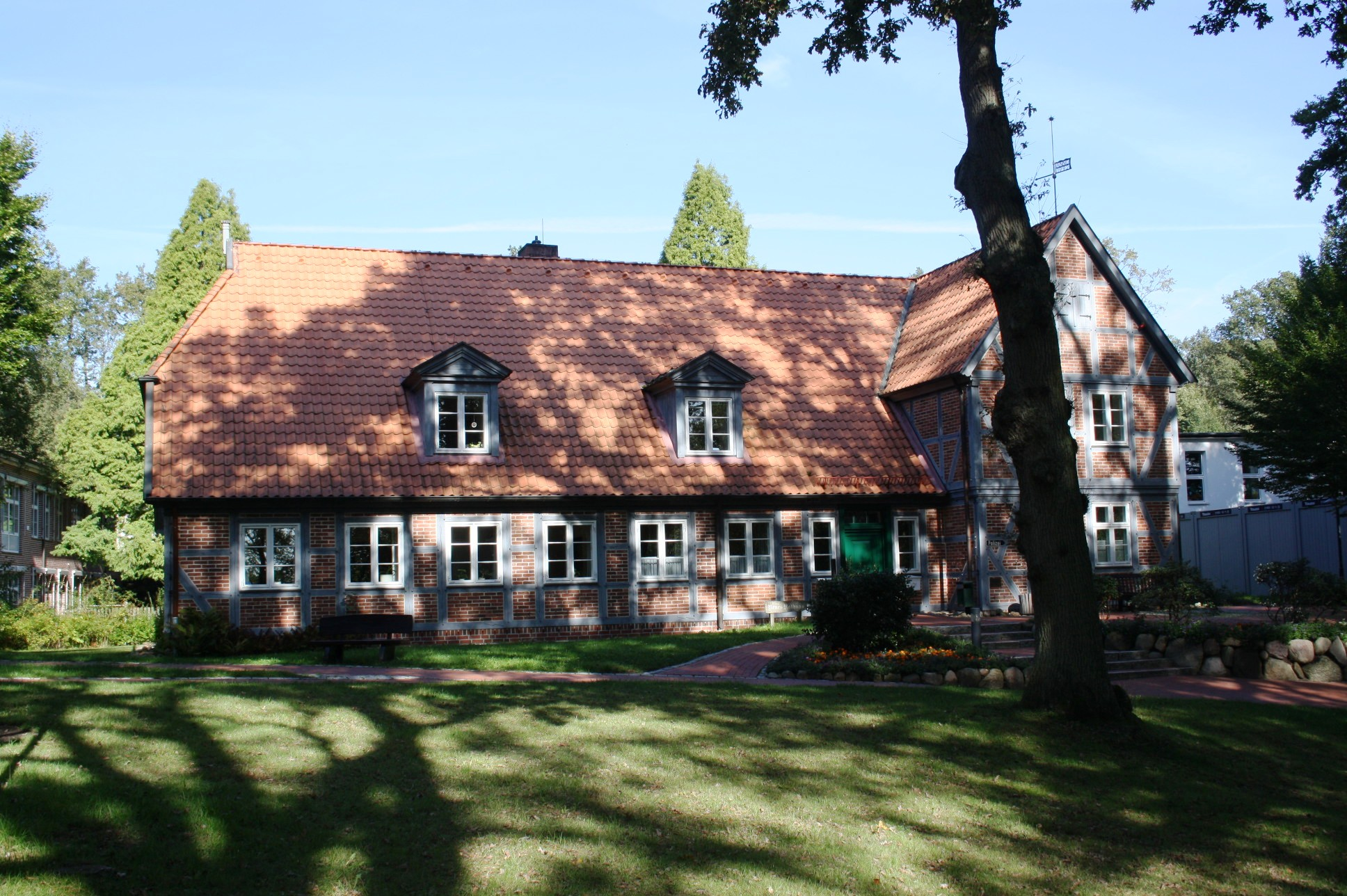 Das Neue Rathaus in Jesteburg